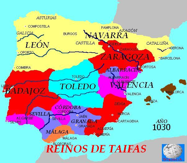 Vient de Cette carte a été dessiné par. Miguel MTN